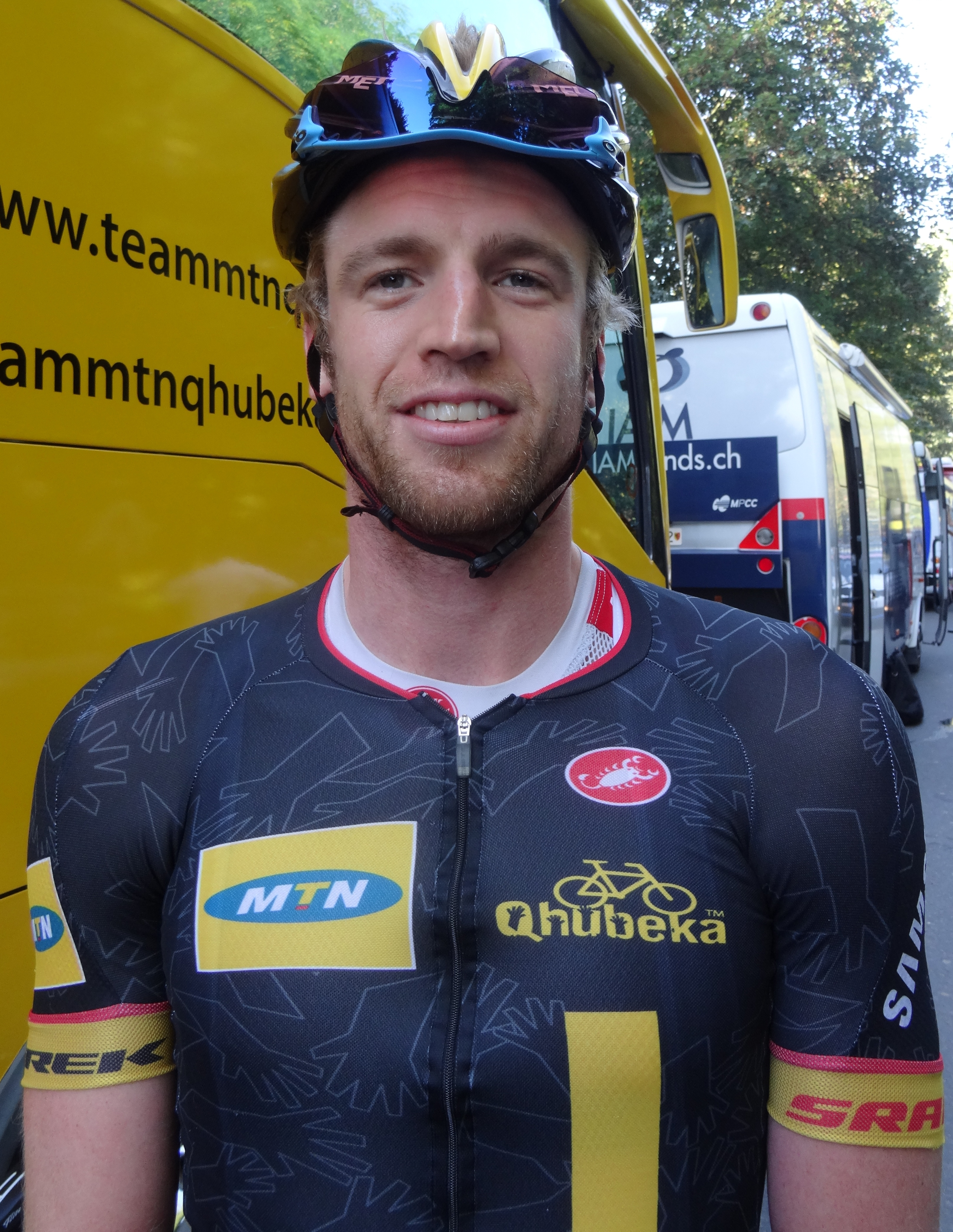 Reportage photographique réalisé le vendredi 3 octobre à l'occasion du départ de la deuxième étape de l'Eurométropole Tour 2014 à Estaimbourg (Estaimpuis), Belgique.